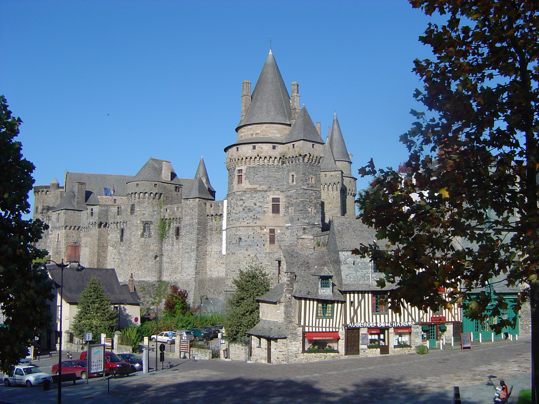 Château de Vitré Place St-Yves